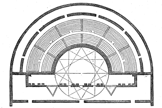 Plan Romeins theater.